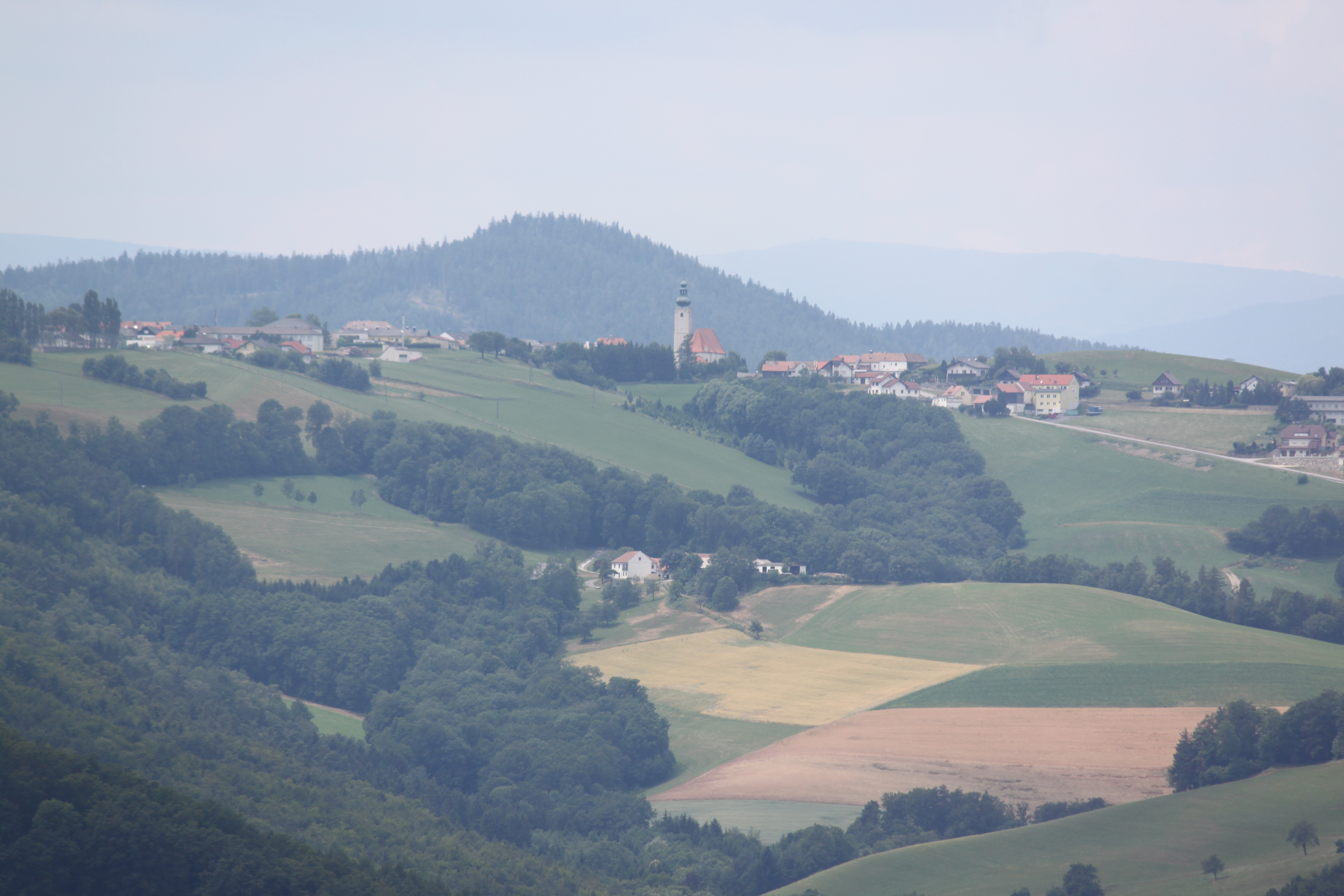 Kath. Pfarrkirche hll. Peter und Paul, vom Museumsturm Schwarzenbach aus